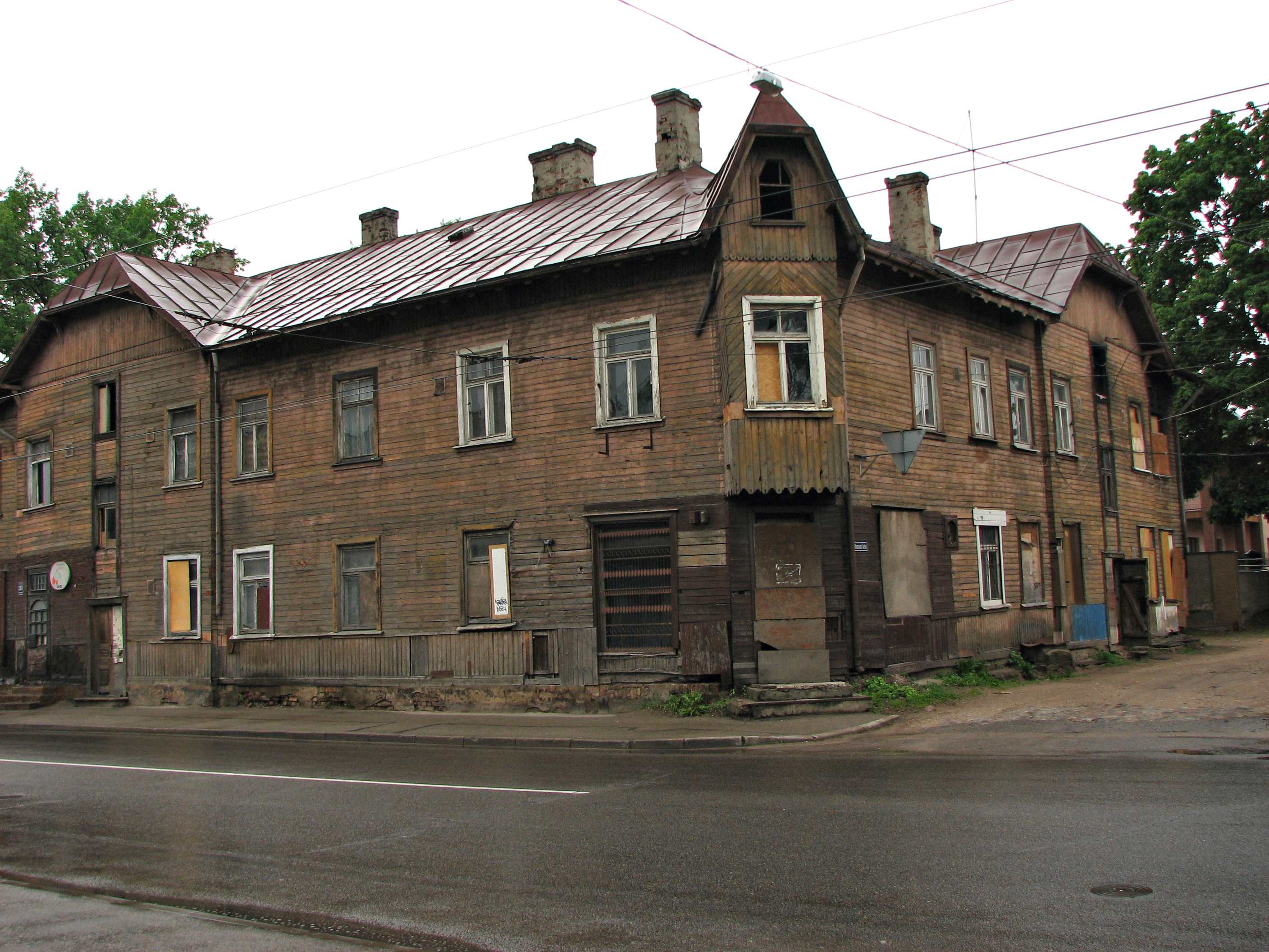 Lubānas iela 33, Rīga